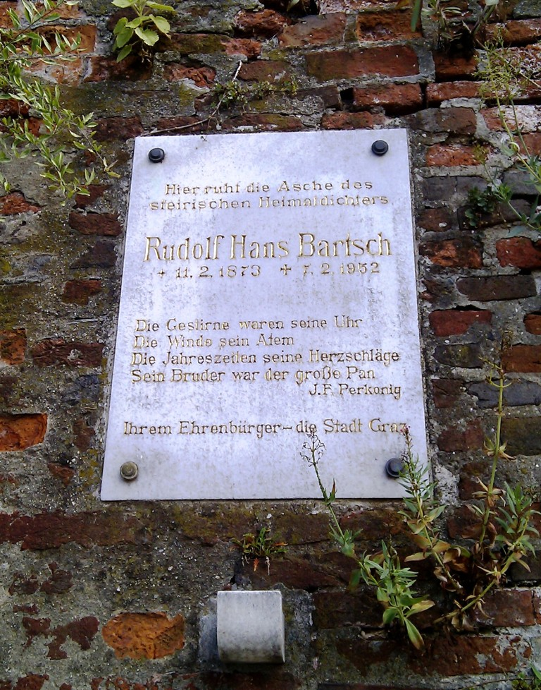 Urnengrab mit Gedenktafel für Rudolf Hans Bartsch, an der Mauer der ehemaligen Stallbastei auf dem Grazer Schlossberg. Der Grabspruch stammt von Josef Friedrich Perkonig.